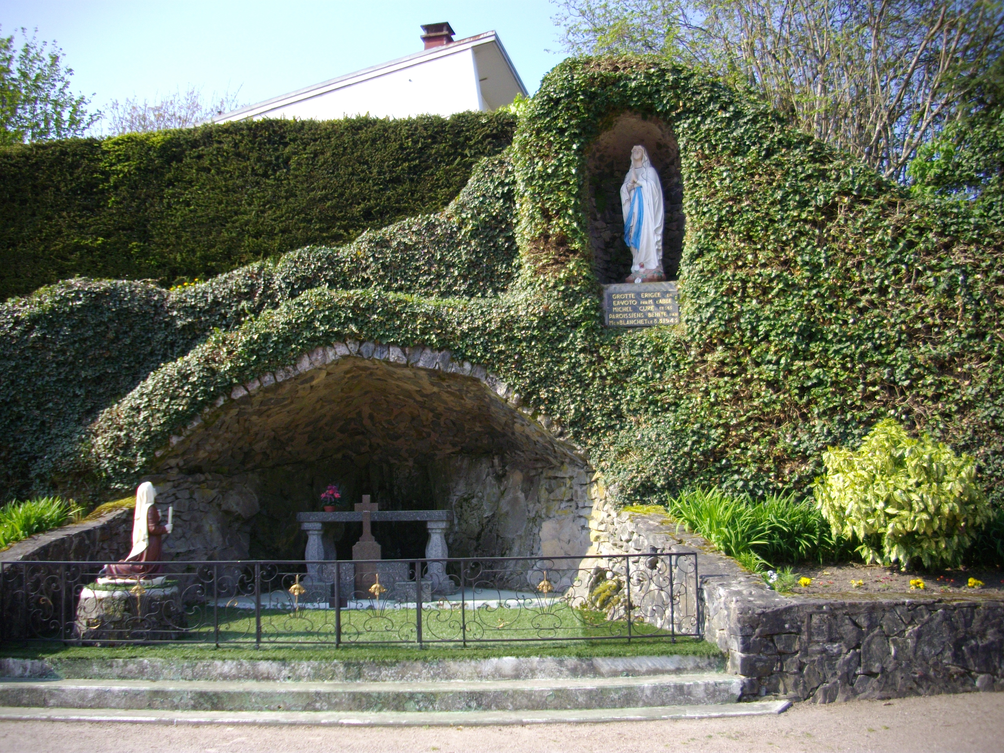 Vosges, Saint-Étienne-lès-Remiremont. Au village, derrière l’église de l’invention de Saint-Étienne (XVIIIe s), consacrée en 1759 : la grotte érigée en ex-voto par M. l'Abbé Michel et ses paroissiens. La grotte a été bénie par Mcp Blanchet le 06-06-1943.